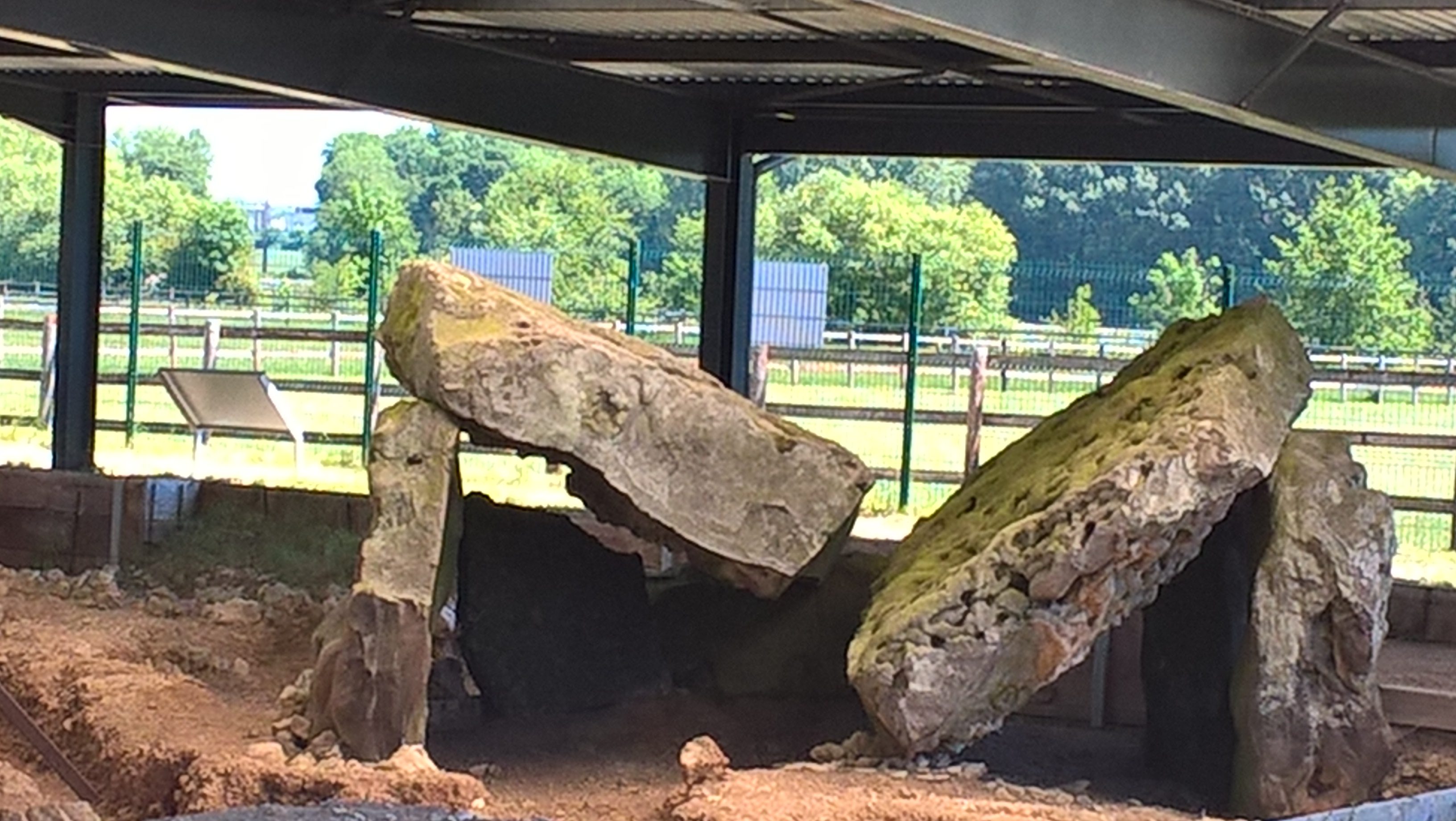 Vue du site mégalithique de Changé